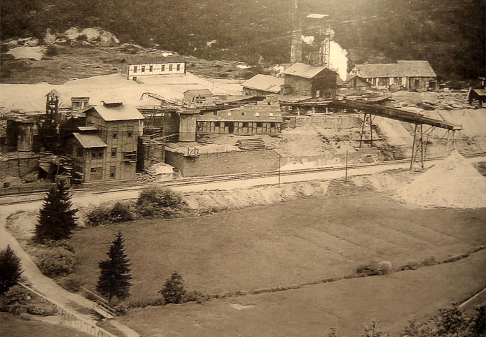 Grube Stahlseifen bei Salchendorf (Neunkirchen) im Siegerland (NRW) ca. 1910